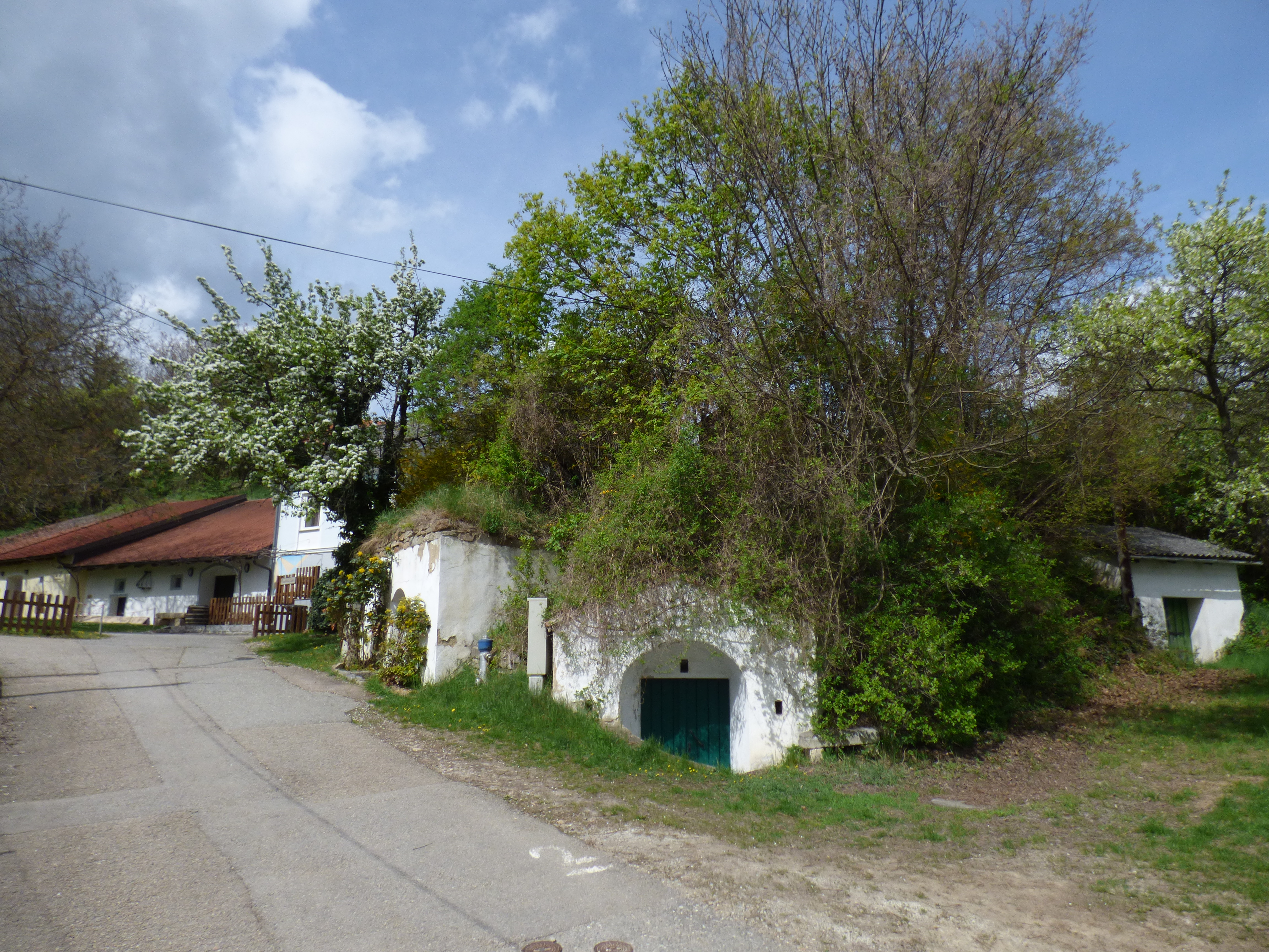 Kellergasse in Maissau (Niederösterreich): Viaduktgasse